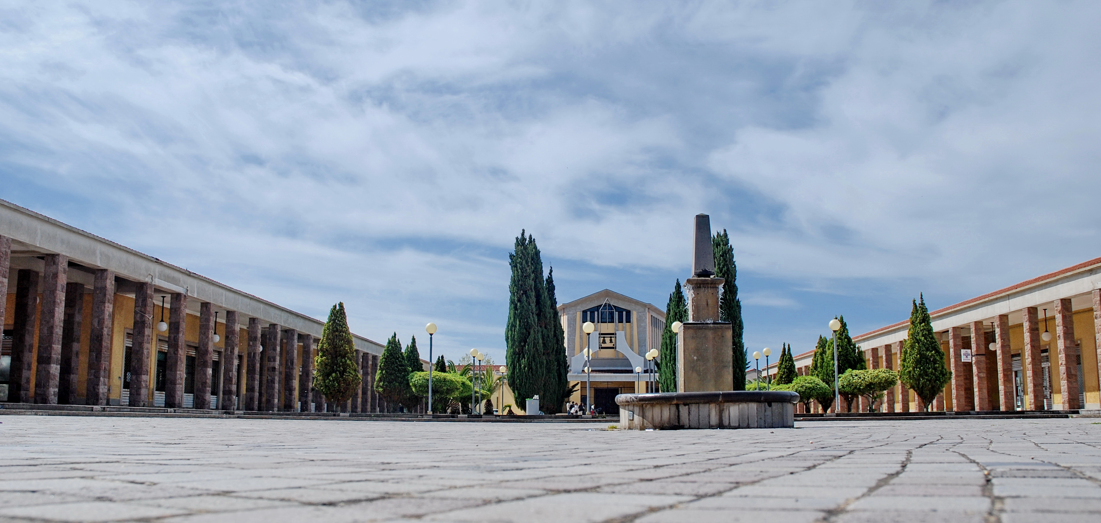 Città razionalista Cortigliana This is a photo of a monument which is part of cultural heritage of Italy.